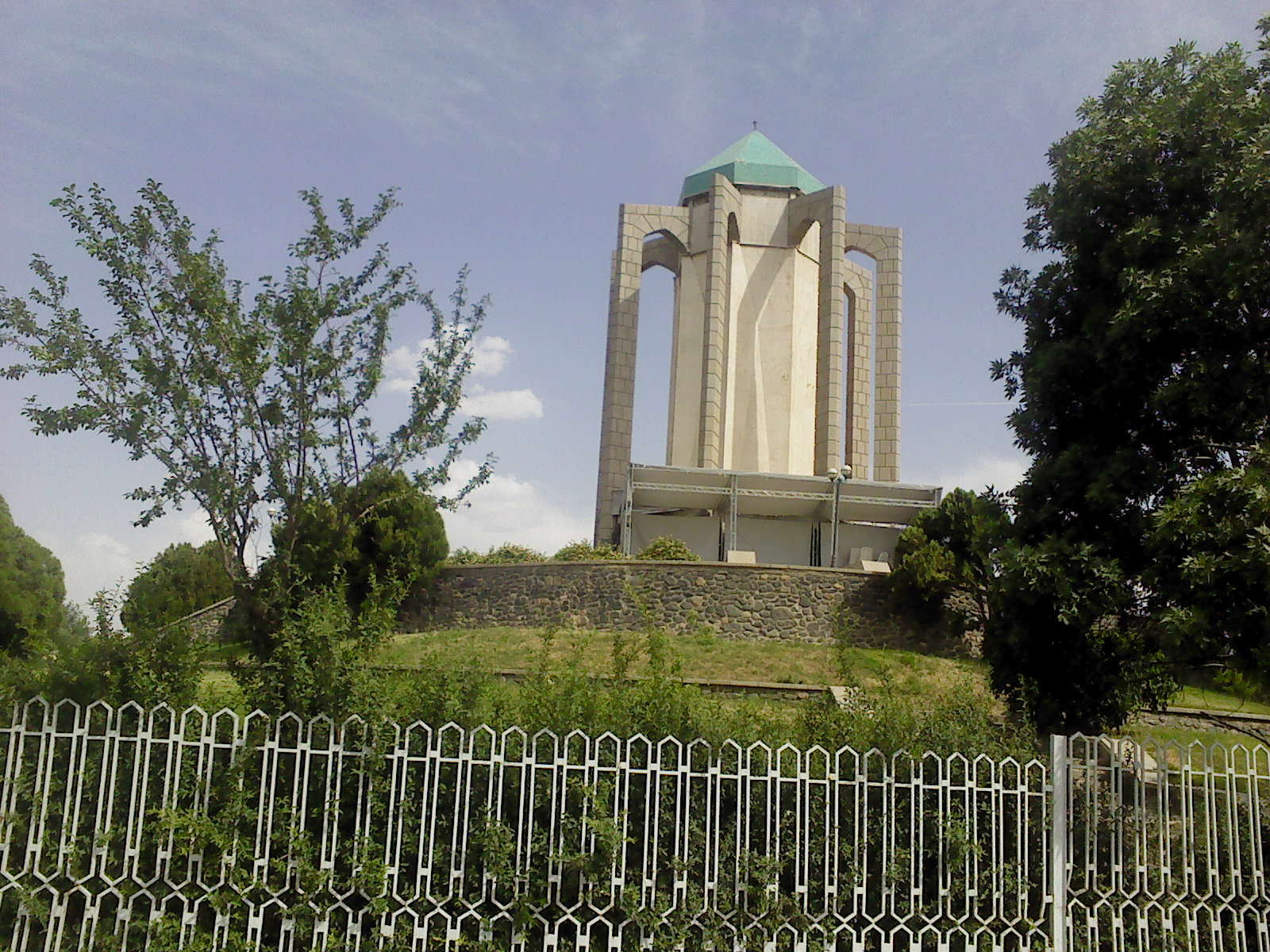 آرامگاه بابا طاهر عریان